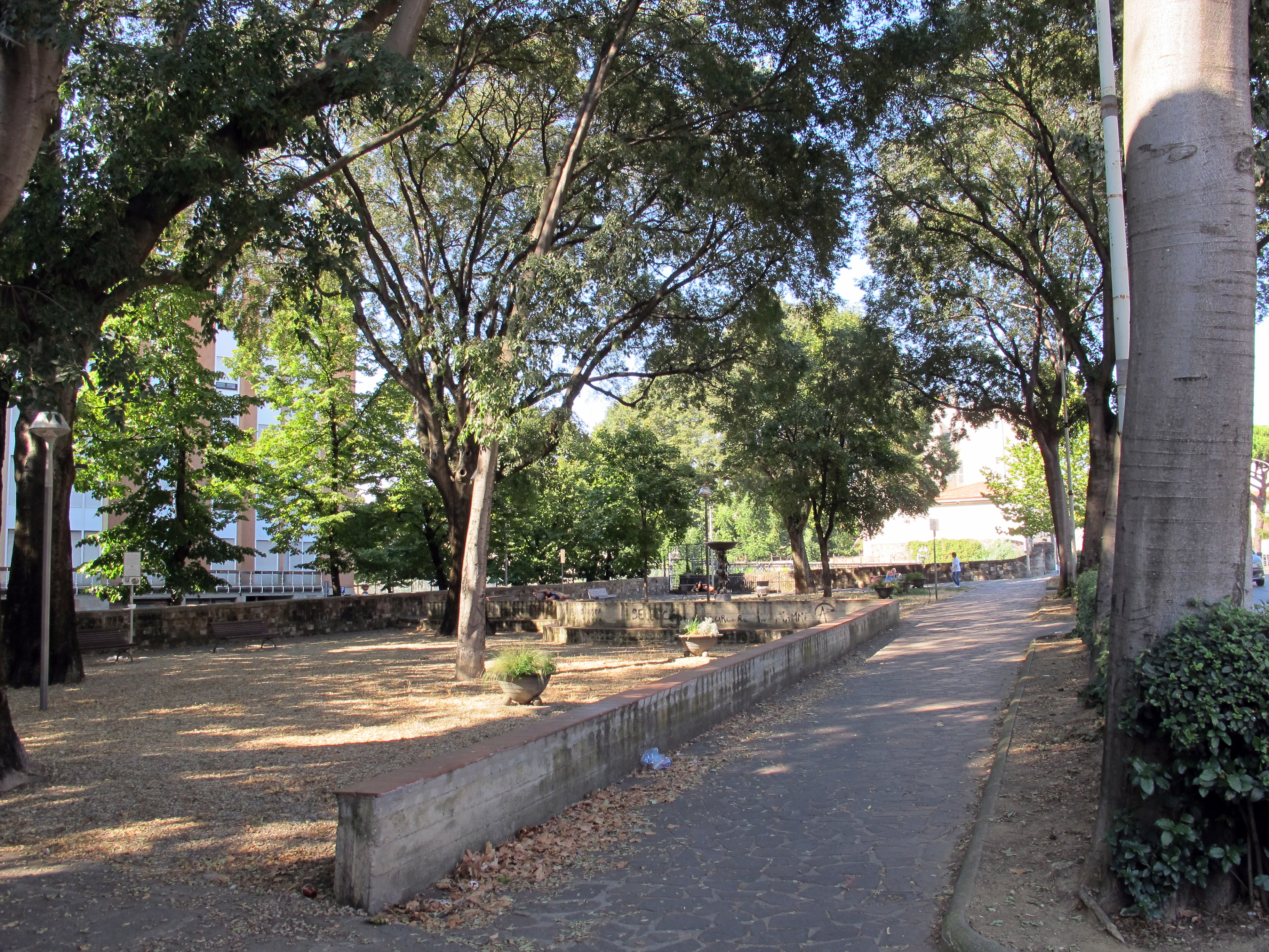 Piazza Vasari (Firenze)